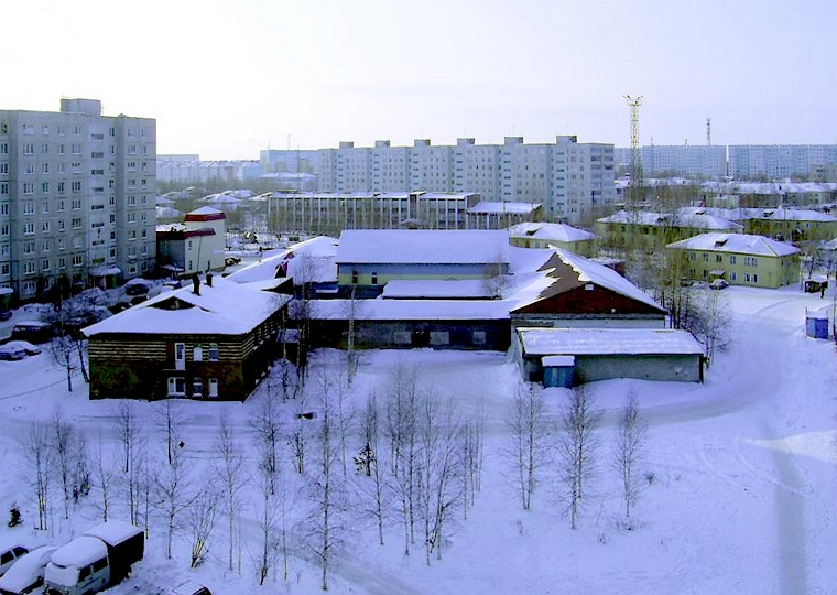 Вид на Мегион